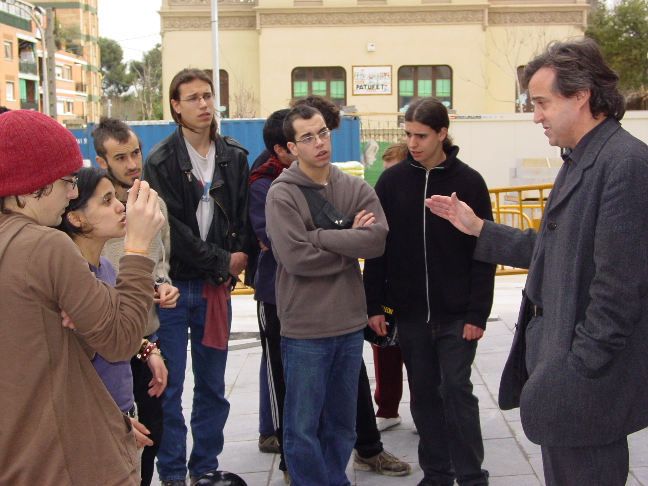 Desallotjament de Casa Okupa a Cerdanyola del Vallès el 2007